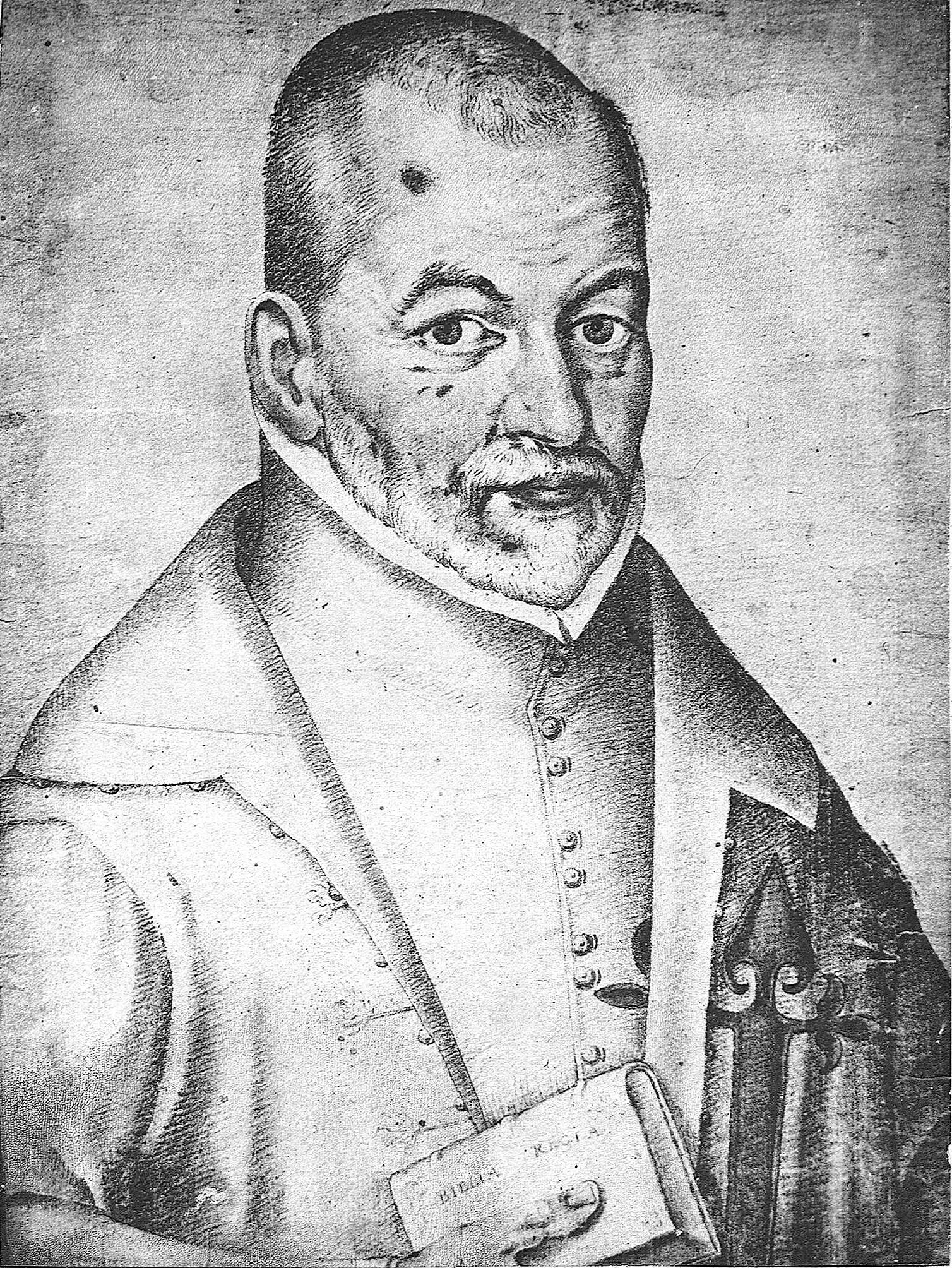 Detalle del retrato de Benito Arias Montano. Dibujo de Francisco Pacheco, (1564-1644) El libro de descripción de verdaderos retratos, ilustres y memorables varones, [Sevilla, s.n., s.a.]- Real Academia de la Historia (Madrid). Signatura: 1/736